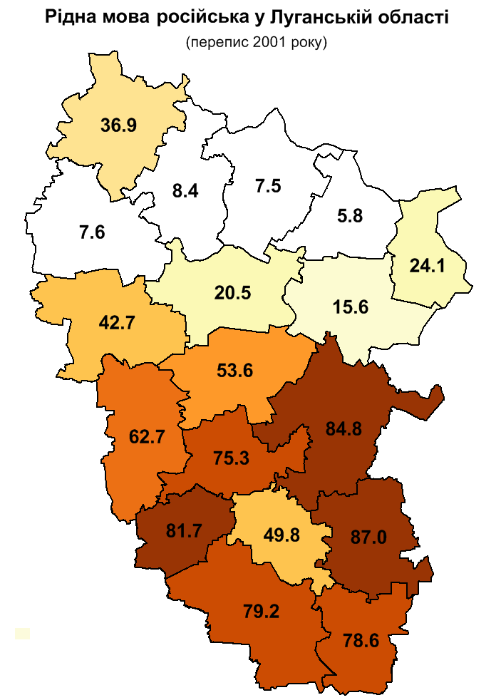 Рідна мова російська у Луганській області за переписом 2001 р./ Russian as native language in Luhansk oblast, 2001 census